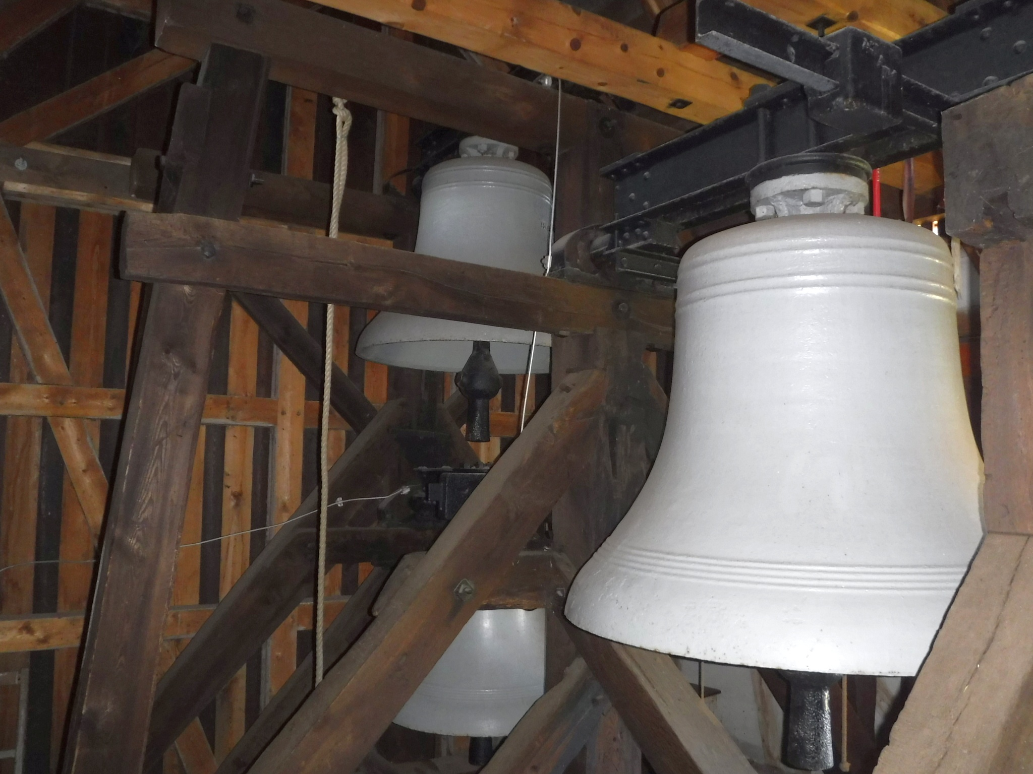 Die Glocken der ehemaligen Kirche in Krakau (Sachsen), heute auf dem Friedhof in Röhrsdorf (Königsbrück)